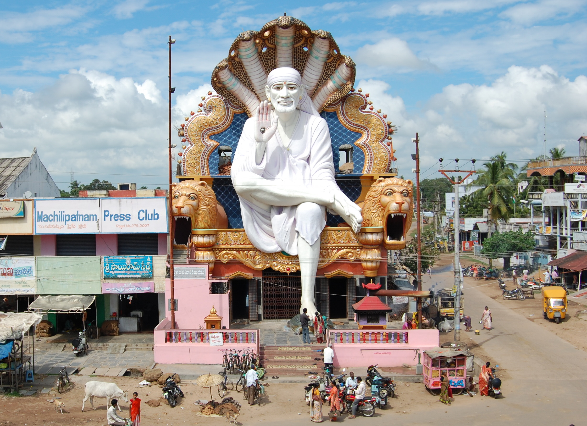 Sai Baba temple at Machilipatnam, India